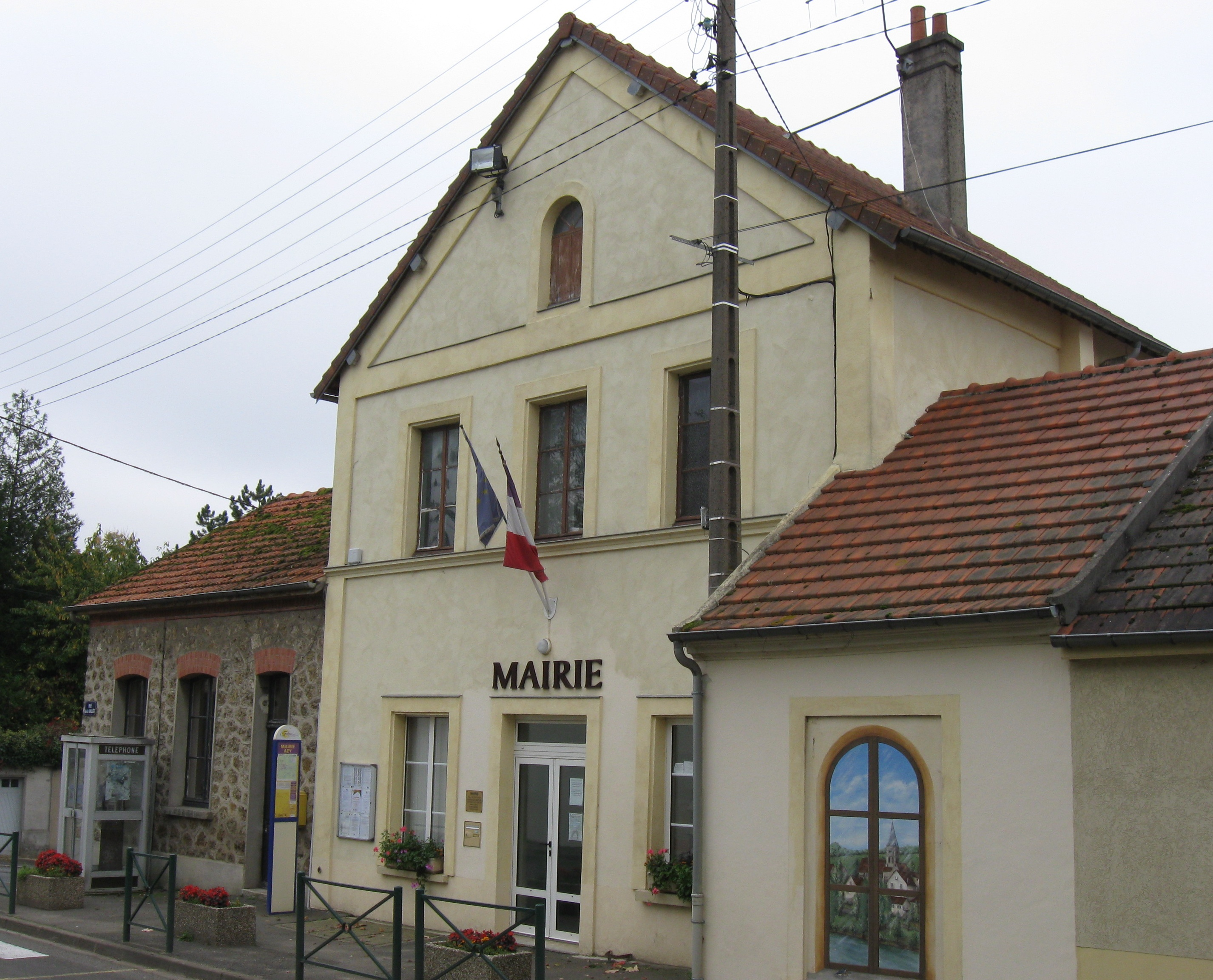 Mairie d.'Azy-sur-Marne. (département de l'Aisne, région Picardie).